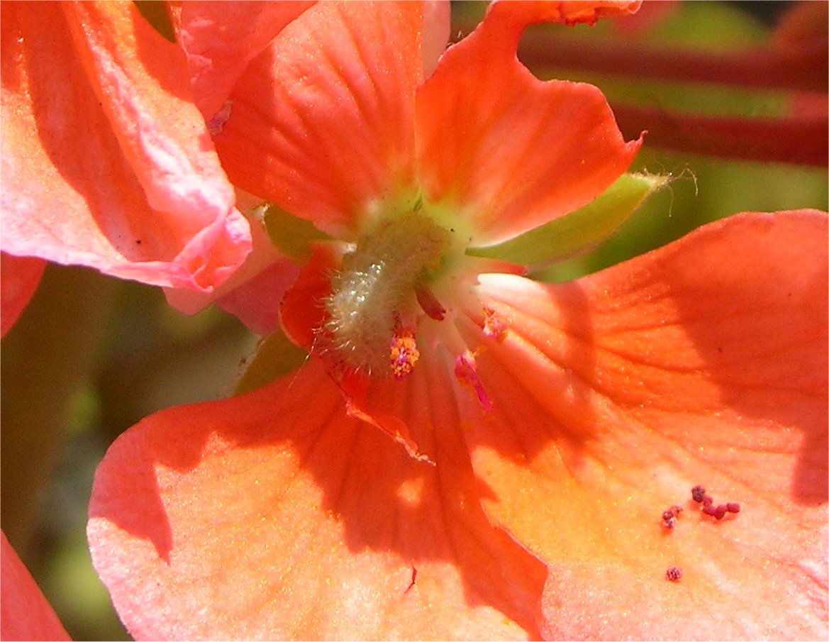 Cacyreus marshalli - larva su fiore di Geranio, a dx gli escrementi